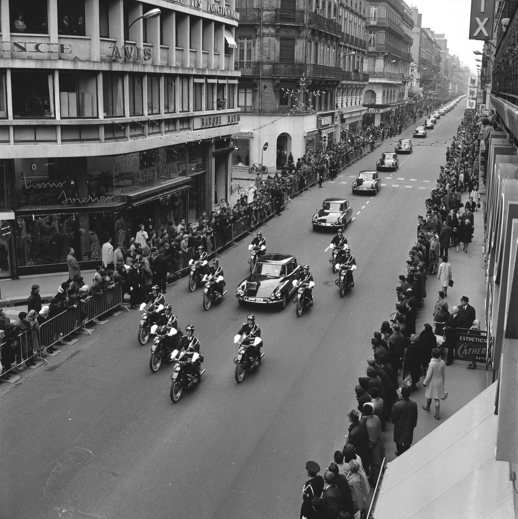 Rue Alsace-Lorraine. Le 5 Novembre 1966. Vue du convoi présidentiel encadré par des motards dans la rue Alsace-Lorraine.